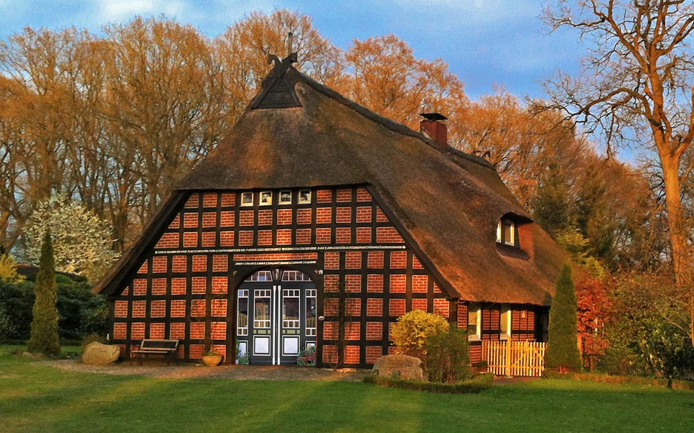 Ostehof in Weertzen, Borchers Hus von 1813